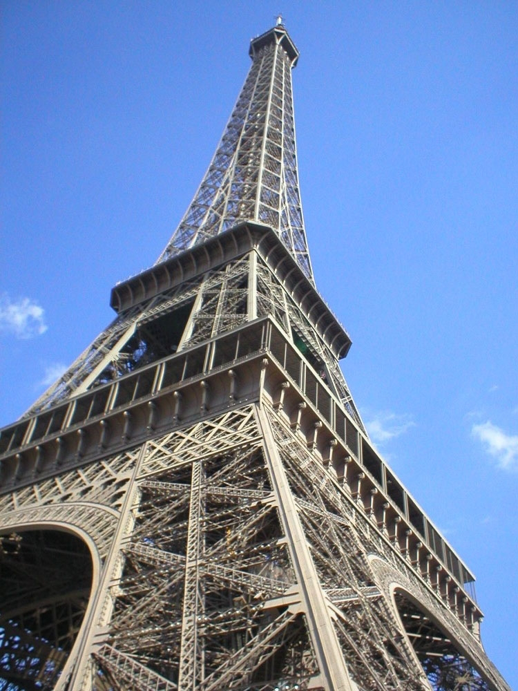 艾菲爾鐵塔（法語La Tour Eiffel）是一座於1889年建成位於法國巴黎戰神廣場上的鏤空結構鐵塔，高320米。